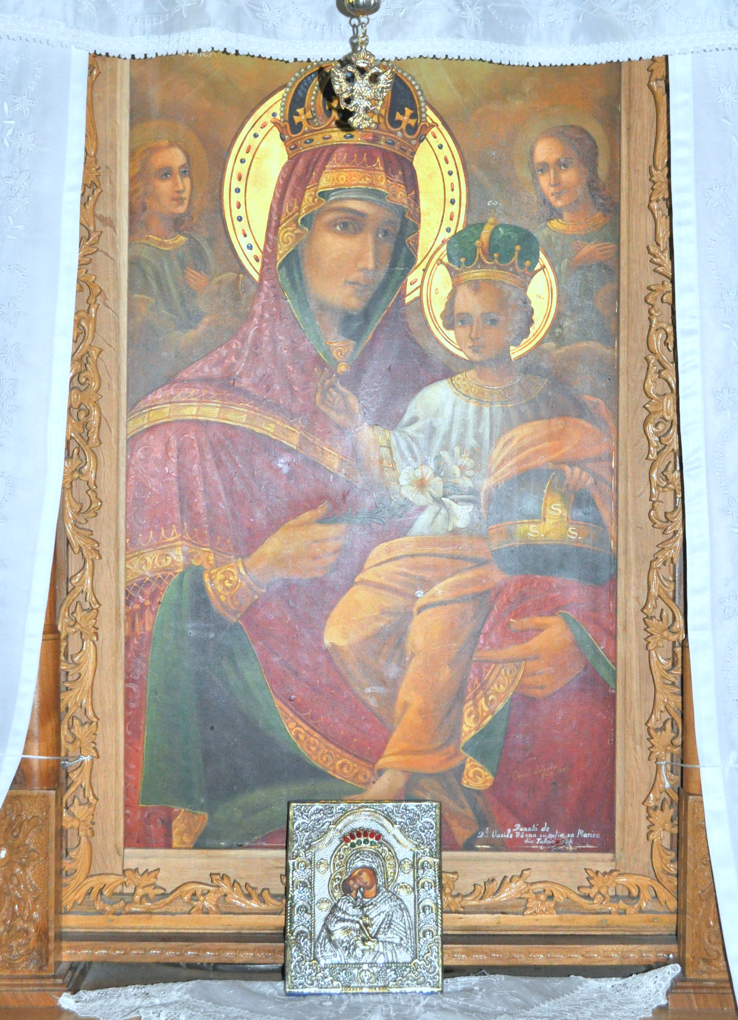 Mănăstirea Lepșa, Vrancea